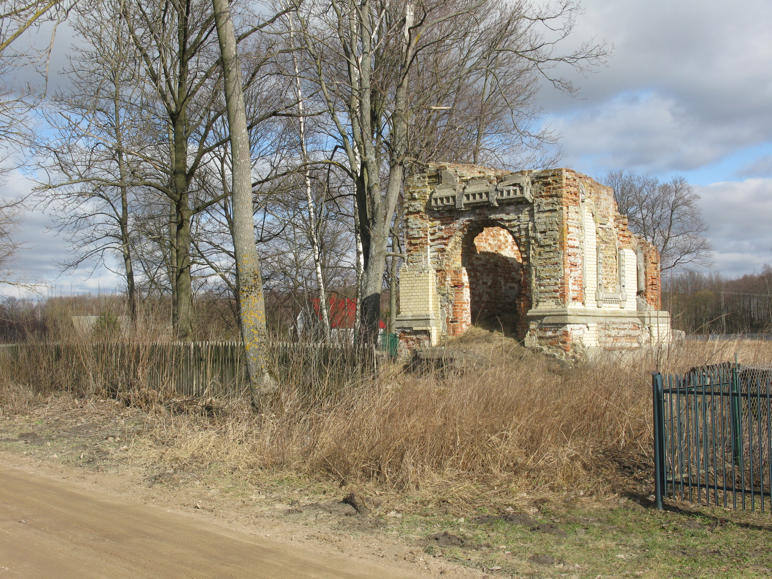 Grobowiec rodziny Żołtuchinów w Podbielu.